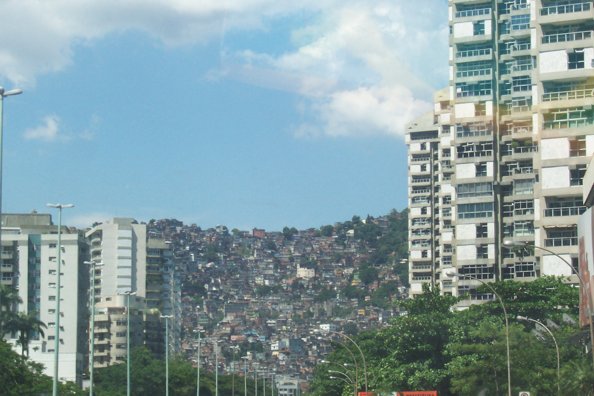 View of the Favela Rocinha, São Conrado, Rio de Janeiro.